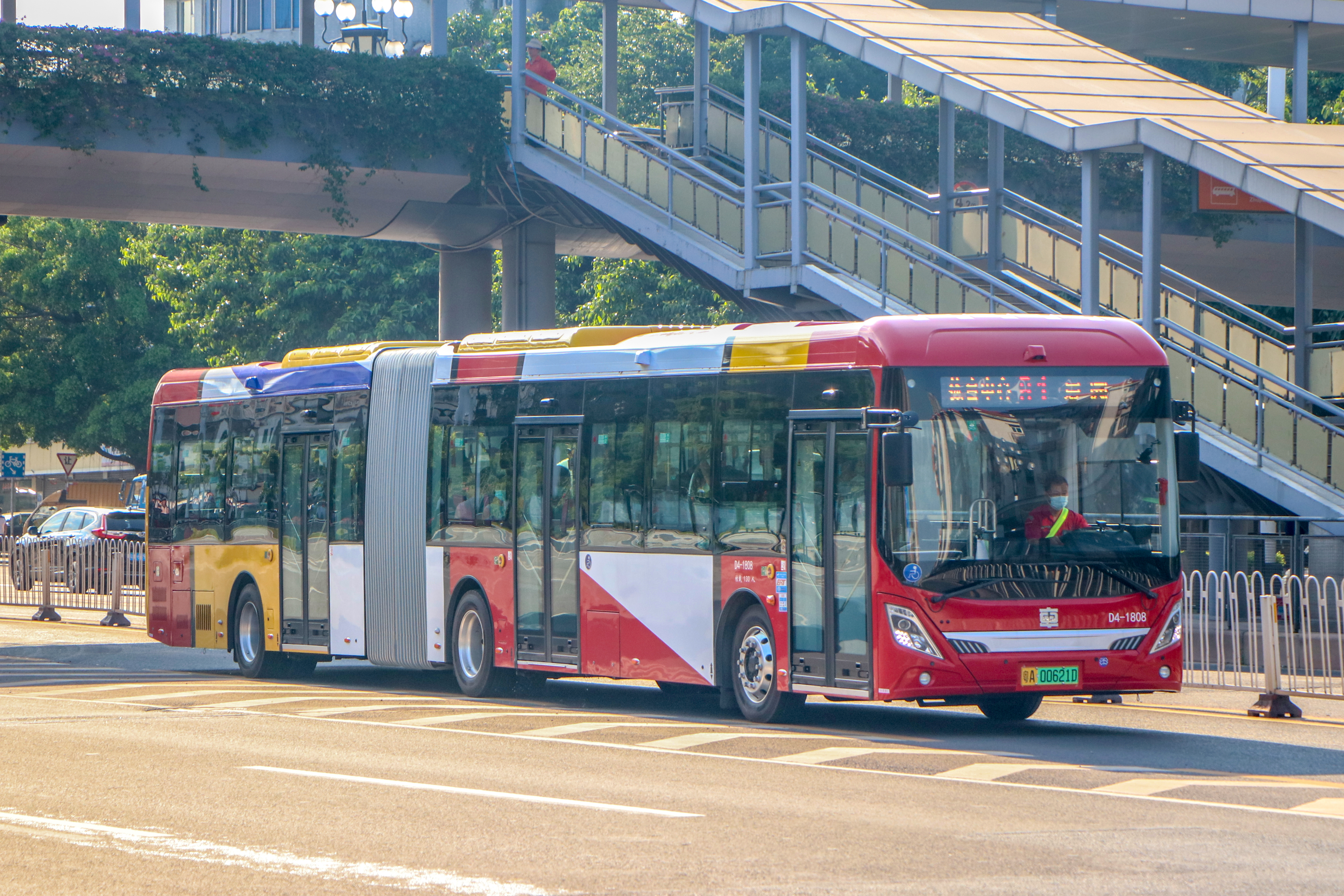 广州公交BRT B1路 TEG6180BEV02